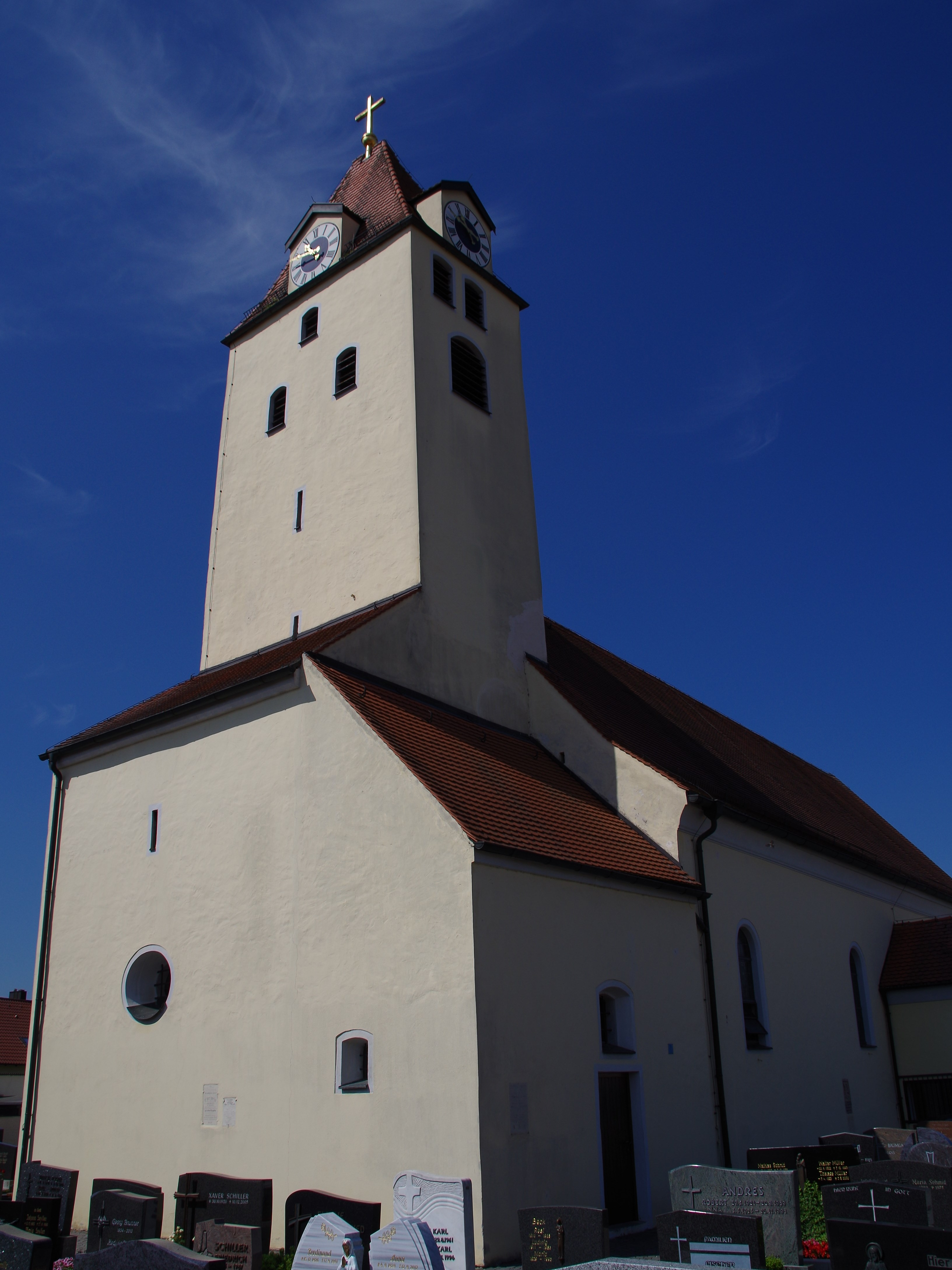 Mariä Verkündigung - Tegernheim